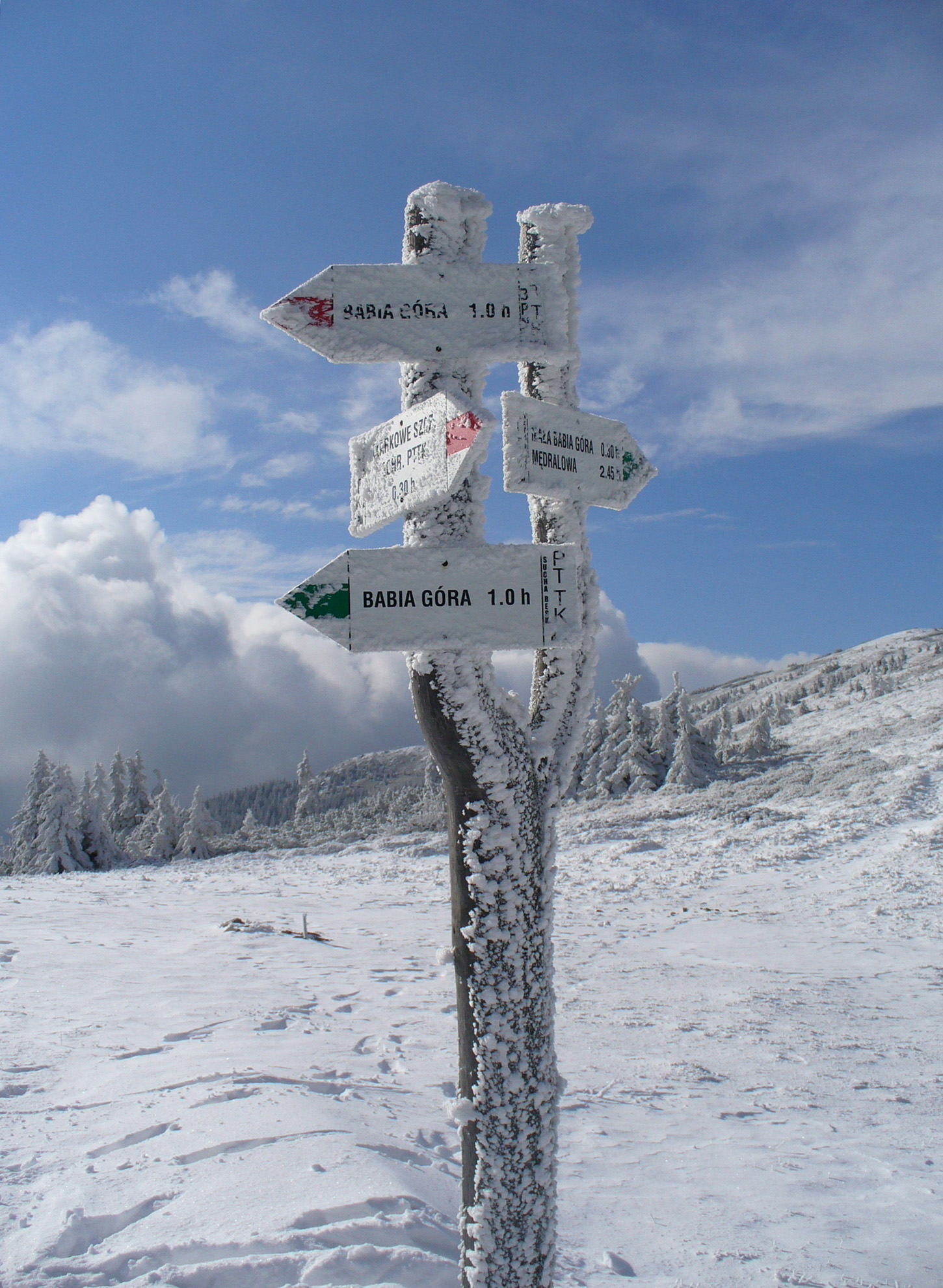 Drogowskaz na przełęczy Brona w Beskidzie Żywieckim Mountain pass (przełęcz Brona) in Żywiec Beskids, Poland